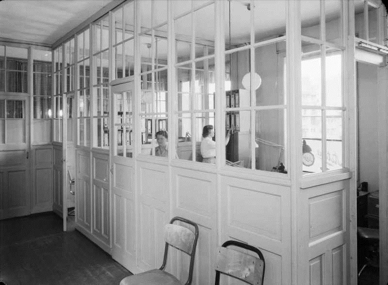 A. Stokstad & Co. konfeksjons- og trikotasjefabrikk, interiør, kontor, kvinner2.